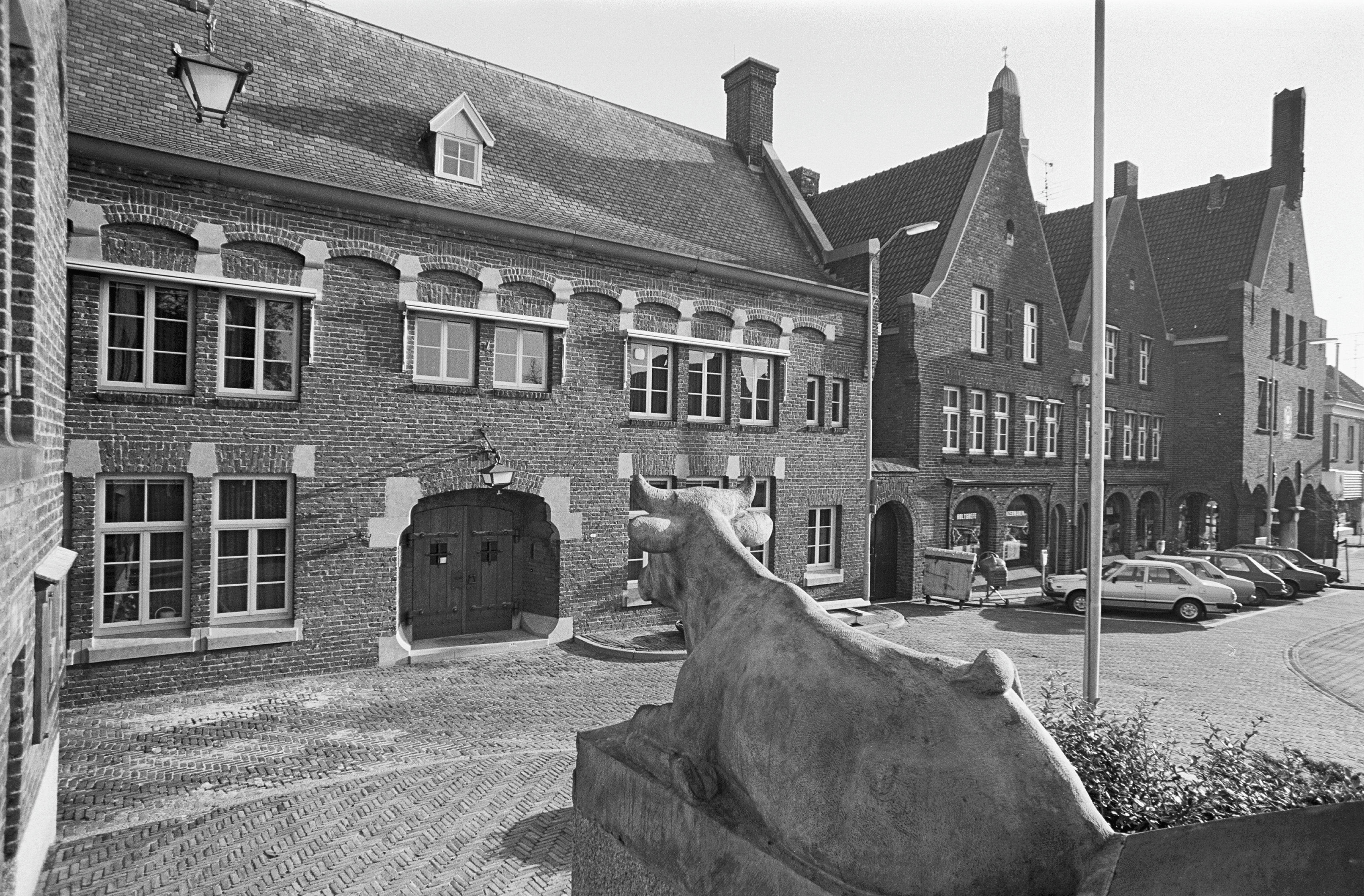 overzicht